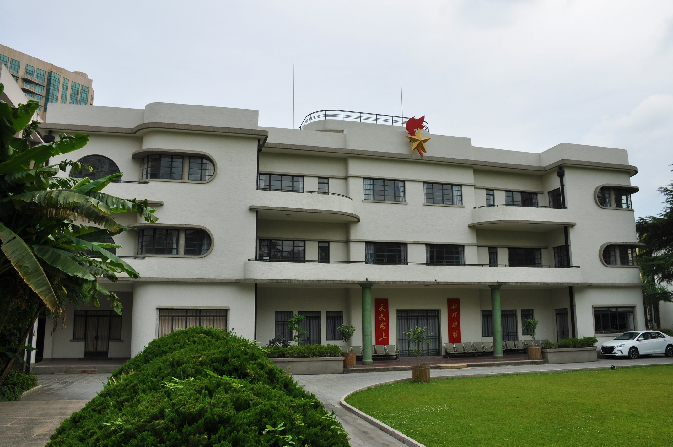 荣氏花园住宅 徐汇区少年宫 高安路18弄20号